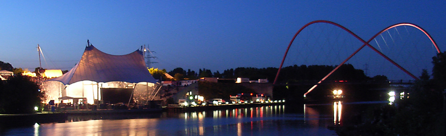 Amphitheater Gelsenkirchen während des Rock Hard Festivals 2008 mit der markanten Doppelbogenbrücke im Hintergrund.